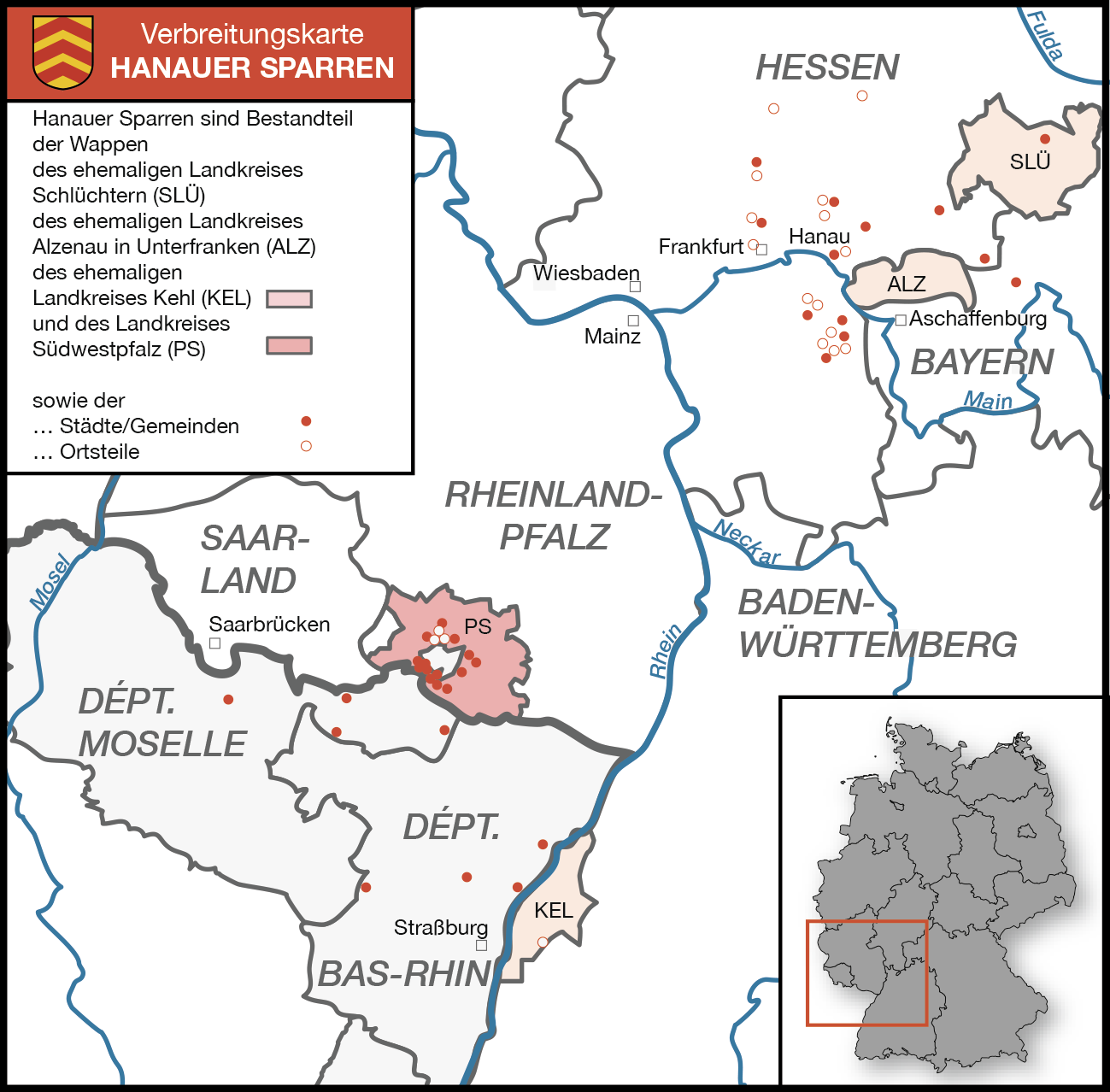 Städte/Gemeinden und Stadtteile/Ortsteile mit Hanauer Sparren im Wappen